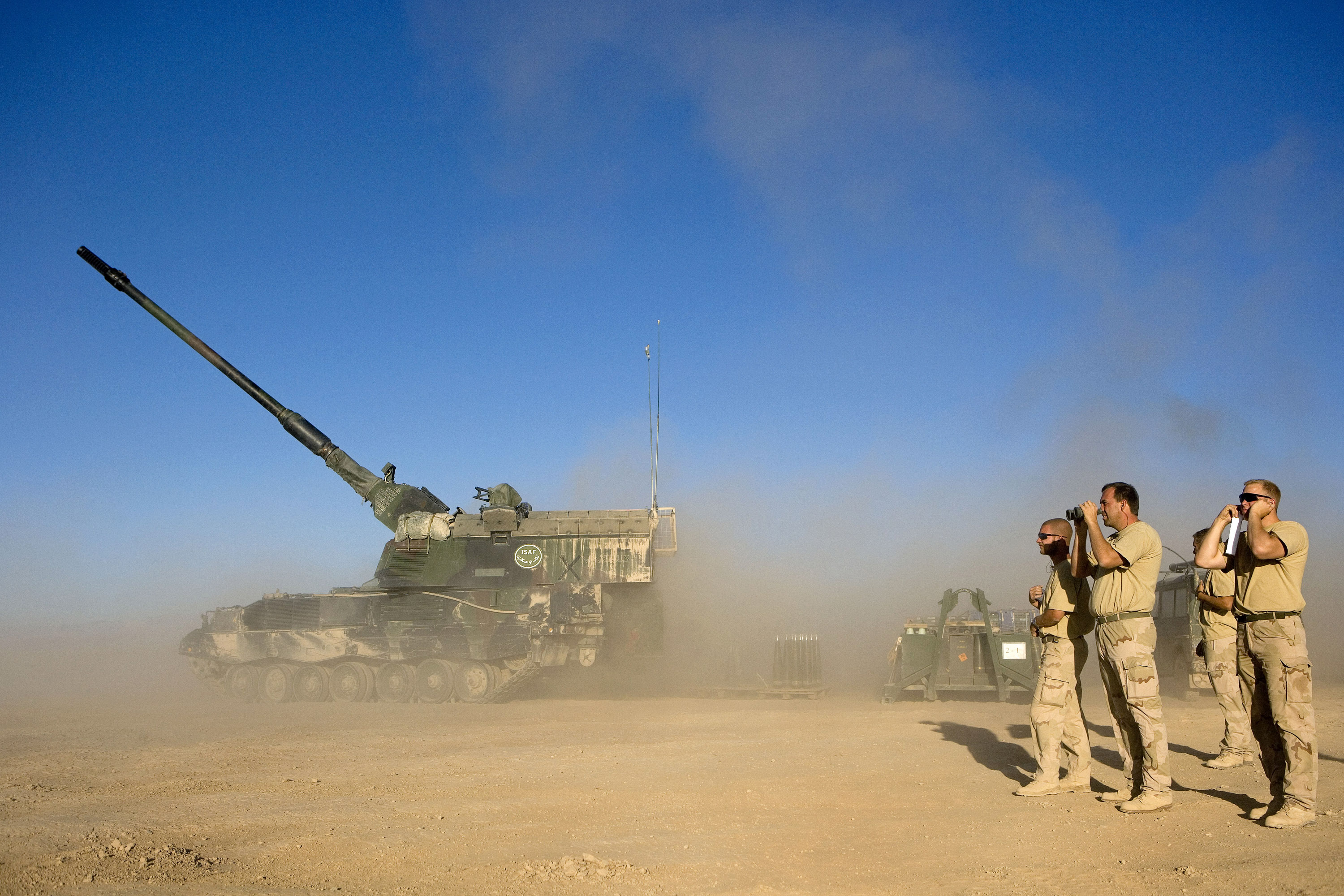 The following is the author's description of the photograph quoted directly from the photograph's Flickr page."Een pantserhouwitser van 14 afdeling veldartillerie (B-batterij, C-peloton) vuurt met zijn 155 mm kanon vanaf kamp Holland, Tarin Kowt, Uruzgan, op stellingen van vijandige elementen in Chora, Uruzgan.Foto: Enkele bemanningsleden van de pantserhouwitzer kijken toe. "